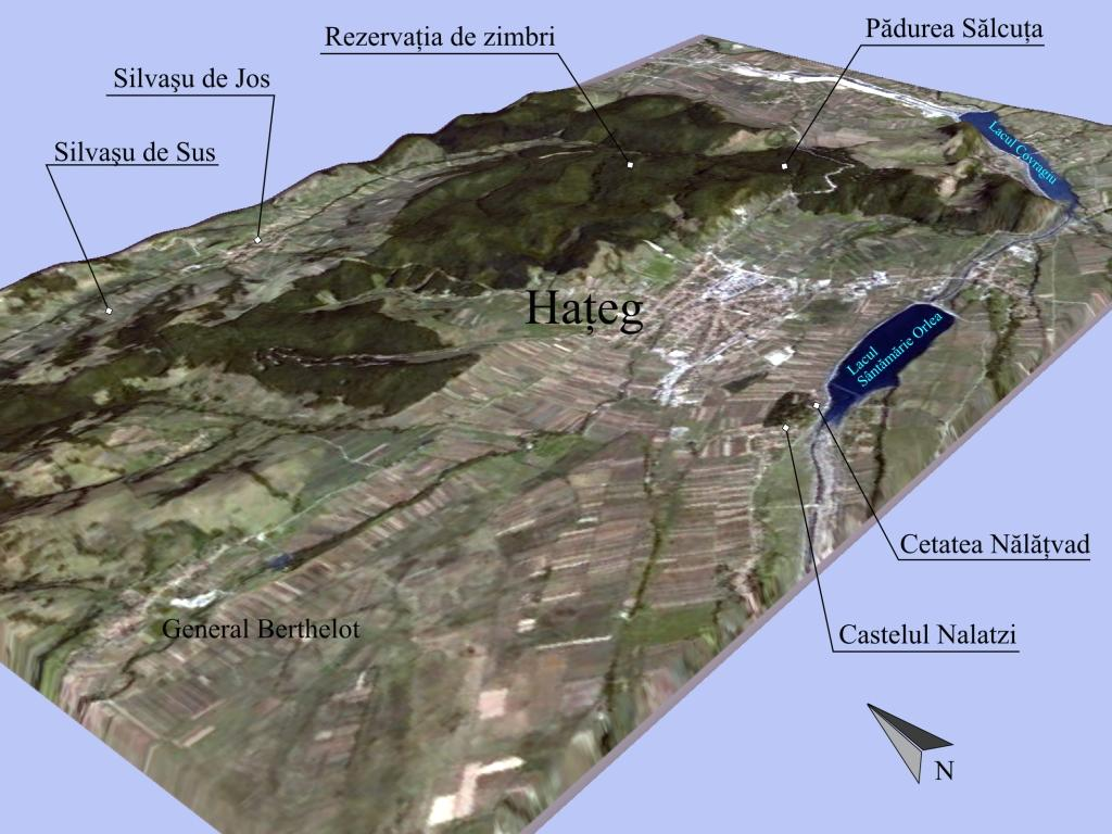 Prelucraare 3D pentru Hateg - Romania. Imagine realizata cu date SRTM si textura World Imagery.